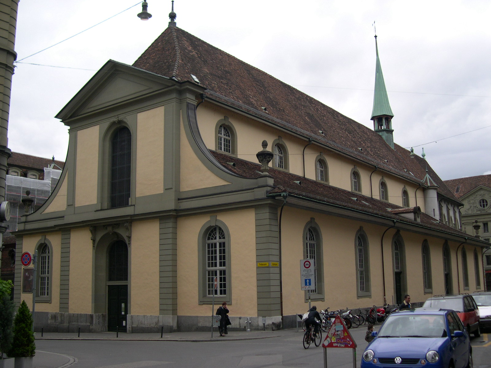 Das Schiff der Französischen Kirche in Bern